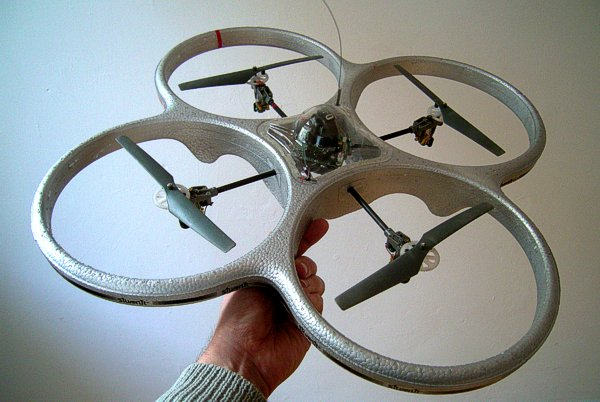 Xufo Modell Quadrocopter